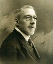 Jan Bukáček (1861 - 1940), Moravský právník.